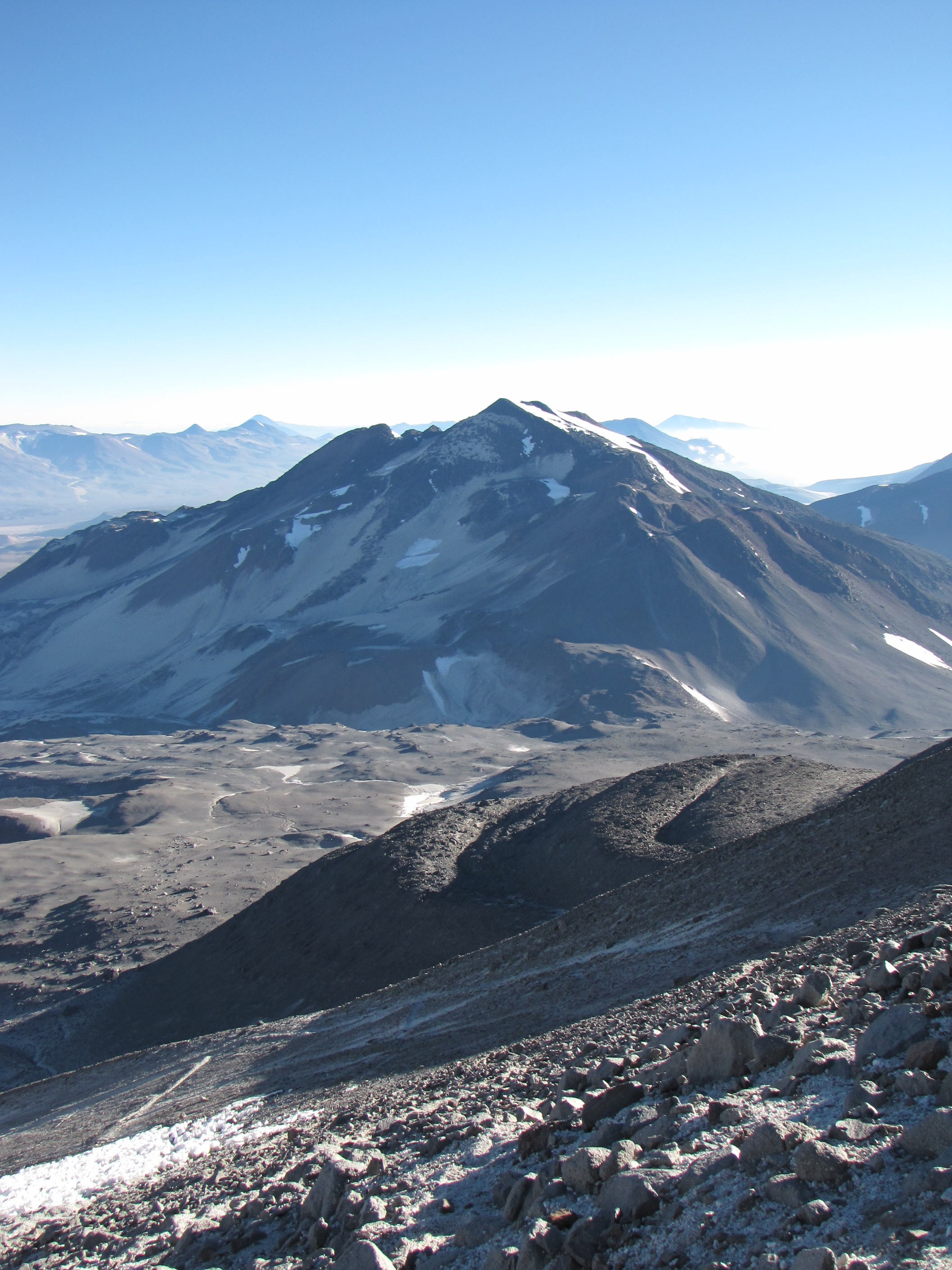 Cerro El Muerto as seen from Ojos del Salado, Andes.